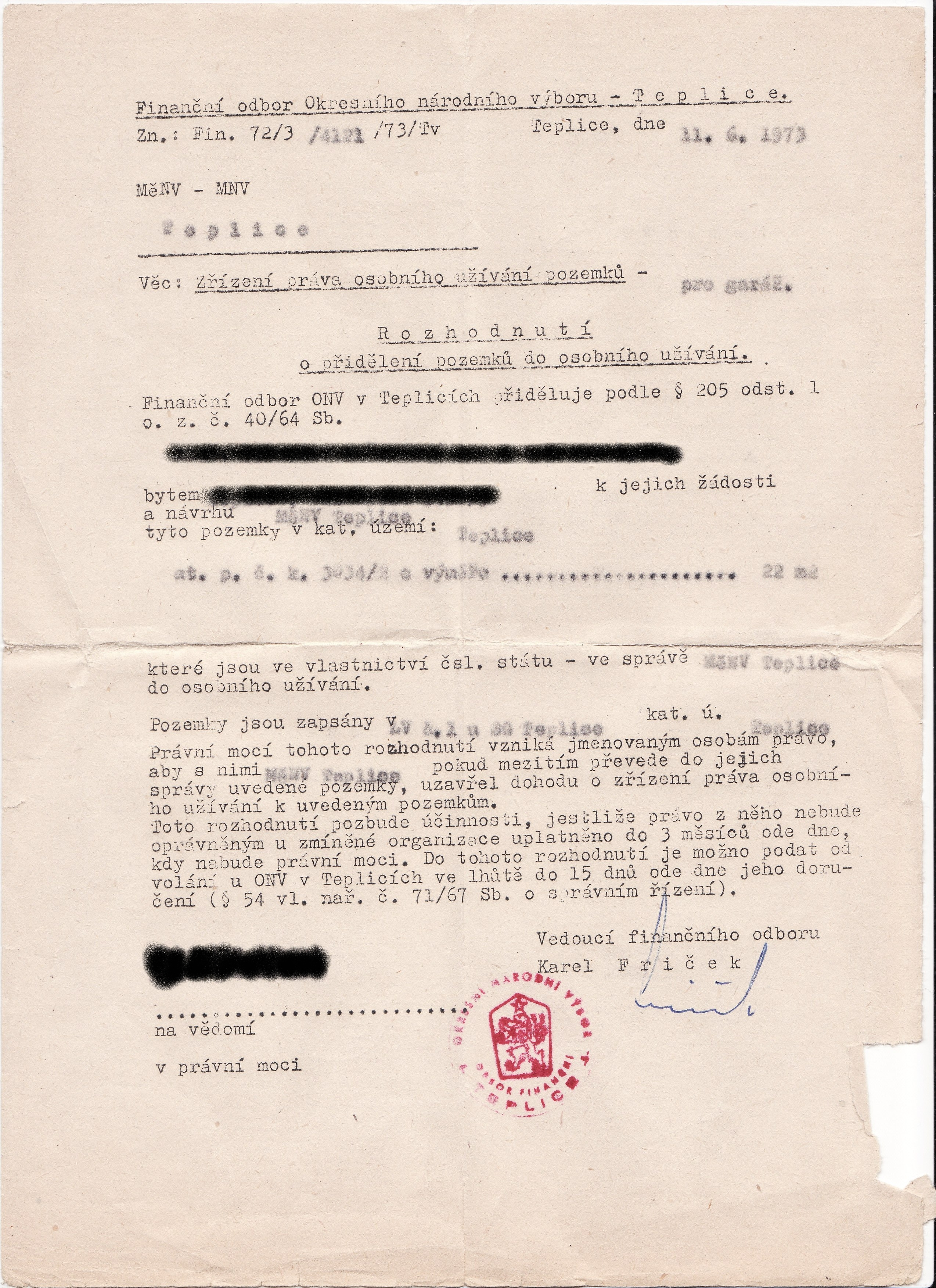 Česky: Vyjádření národního výboru umožnující používání pozemků (zahrada) z roku 1973.